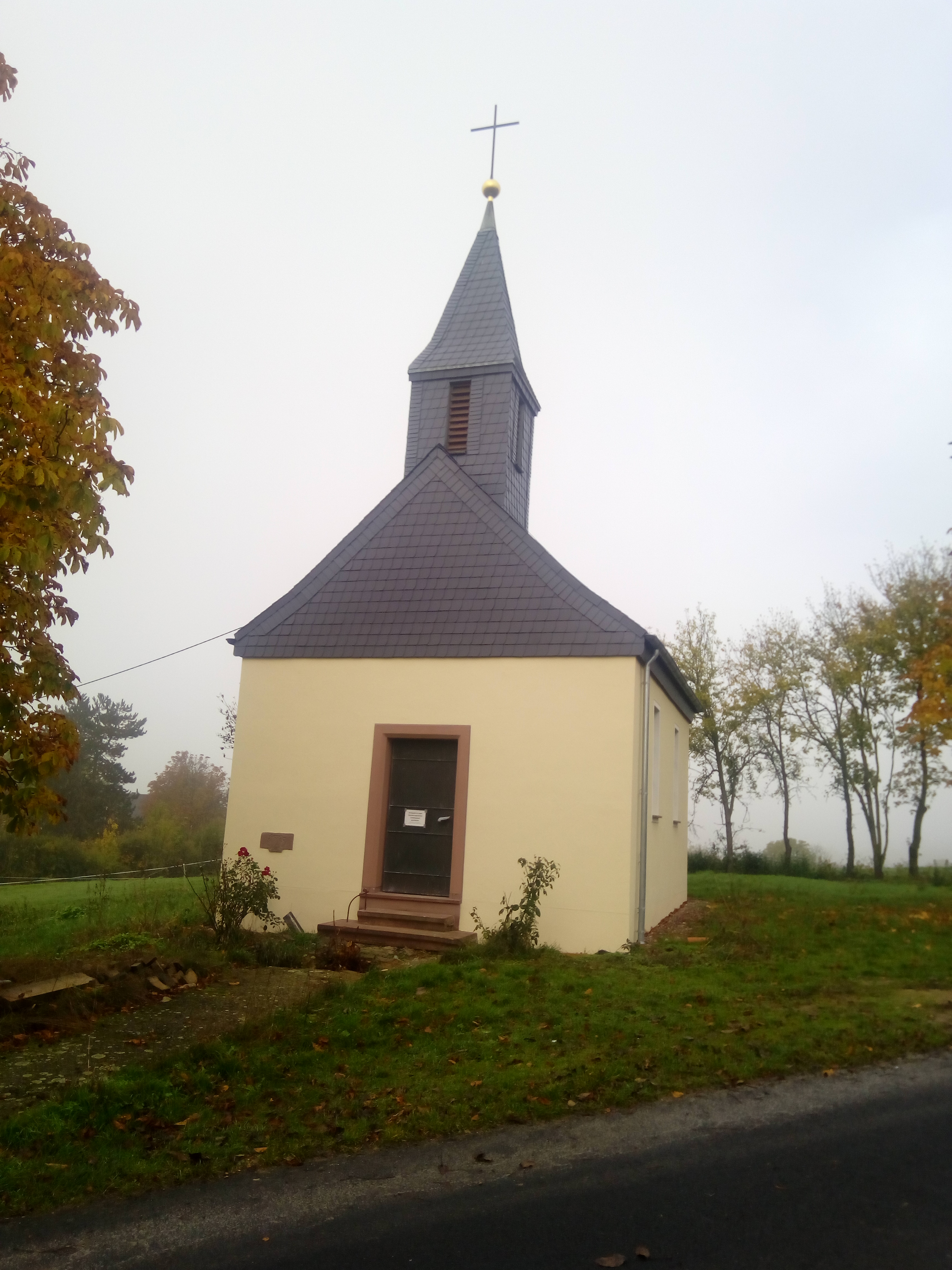 Die Kapelle wurde in Wolferstetten Stein für Stein abgebaut und an der Siedlung Roter Rain wiedererrichtet